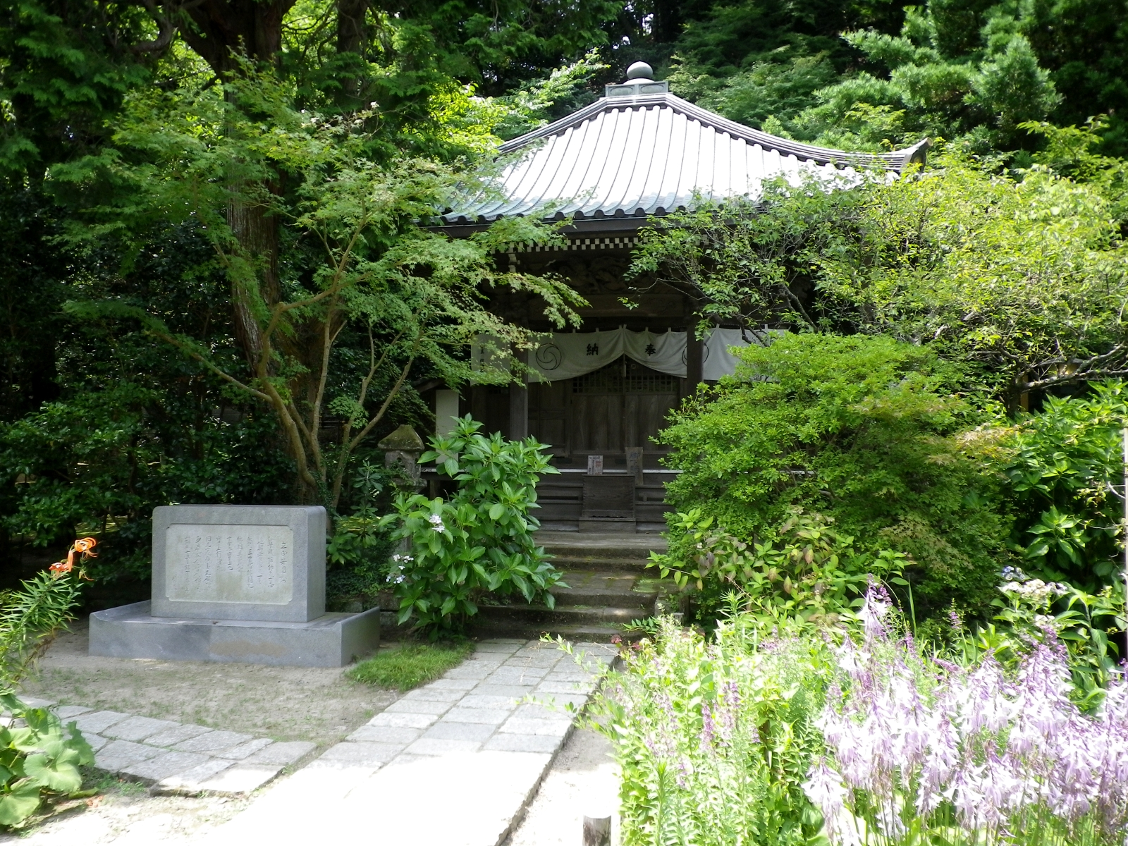 安国論寺御小庵